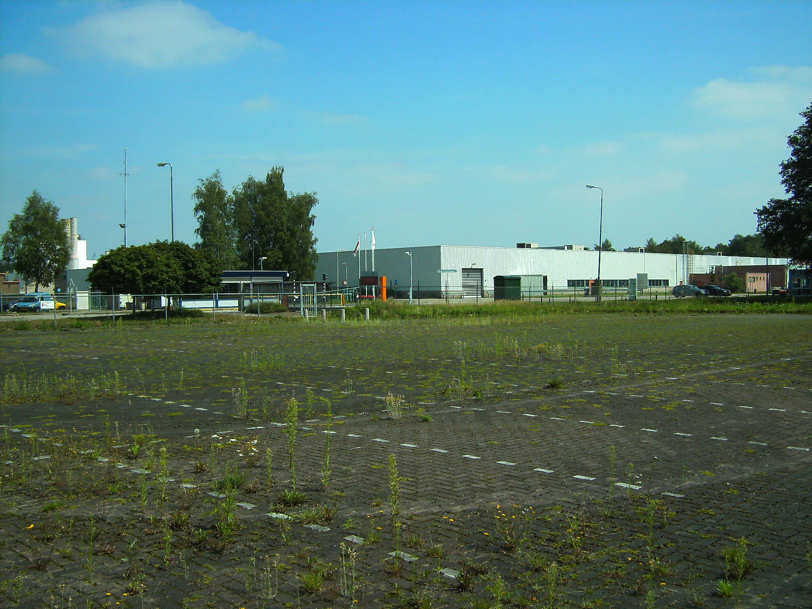 De voormalige Berghuizerpapierfabriek te Wapenveld. Goed lopend bedrijf dat door de Finse eigenaar Enzo in 2008 werd geloten om 'productiecapaciteit uit de markt te nemen'